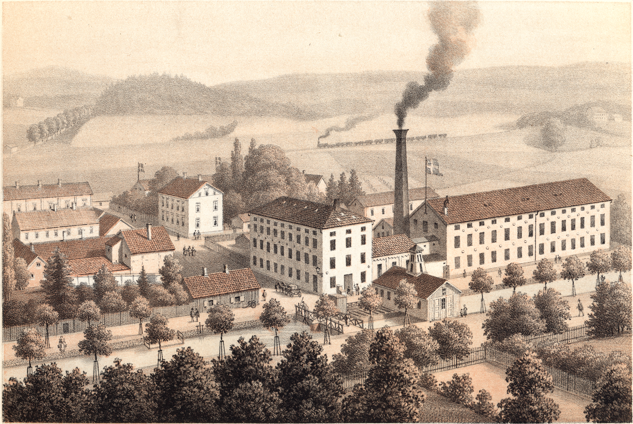 Charles Hills bomulls-wäfveri & färgeri i Alingsås. Framför byggnaderna flyter Gerdska ström, ofta kallad Lillån. Hitom strömmen går Norra Strömgatan och på andra sidan vattnet Södra Strömgatan. I mitten av bilden ses en fördämning med en bro, en rest av en tidigare industri på platsen, och till höger om fördämningen ett varmbadhus uppfört av Charles Hill. Tvärgatan mot Södra Strömgatan är Västra Vattugränd. Till höger om Västra Vattugränd ligger kvarteret Fliten, vilket helt upptas av fabrikslokaler. I mitten av kvarteret finns ett ångpannehus. Tvärs över Västra Vattugränd ligger kvarteret Spinnaren i vilket senare uppfördes en stor tegelbyggnad. Denna byggnad var avsedd för blekeri, färgeri och beredningsverk, men kom i början av 1890-talet att användas för kontor och lager. Huvudkontoret fanns där ända till 1963 då det flyttade till en nybyggd kontorsbyggnad i anslutning till Nya fabriken vid sjön Gerdsken. Bakom kvarteren Fliten och Spinnaren går Plangatan (parallellt med Södra Strömgatan). Bortom Plangatan ligger till höger kvarteret Klädesvävaren i vilket finns två större bostadshus med tillhörande ekonomibyggnader. I korsningen mellan Plangatan och Västra Vattugränd ligger ett hus uppfört på 1870-talet för Edmund Hill. Bortom detta ligger ett äldre hus som är bostad åt Charles Hill. Till vänster ligger kvarteret Skubblaren i vilket finns stall, vagnsbodar och magasin. I kvarteren Spinnaren och Skubblaren (båda till vänster om Västra Vattugränd) finns även arbetarbostäder. Bakom kvarteren Klädesvävaren och Skubblaren går Södra Ringgatan. I fonden ses Västra stambanan med ett tåg som inkommer från Göteborg. Allén uppe till vänster i bild torde vara Göteborgsvägen, landsvägen mot Göteborg. (Källa: Gunnar Berg, Alingsås bomull : ett familjeföretags öden under 100 år, Gleerup, Lund, 1965.)